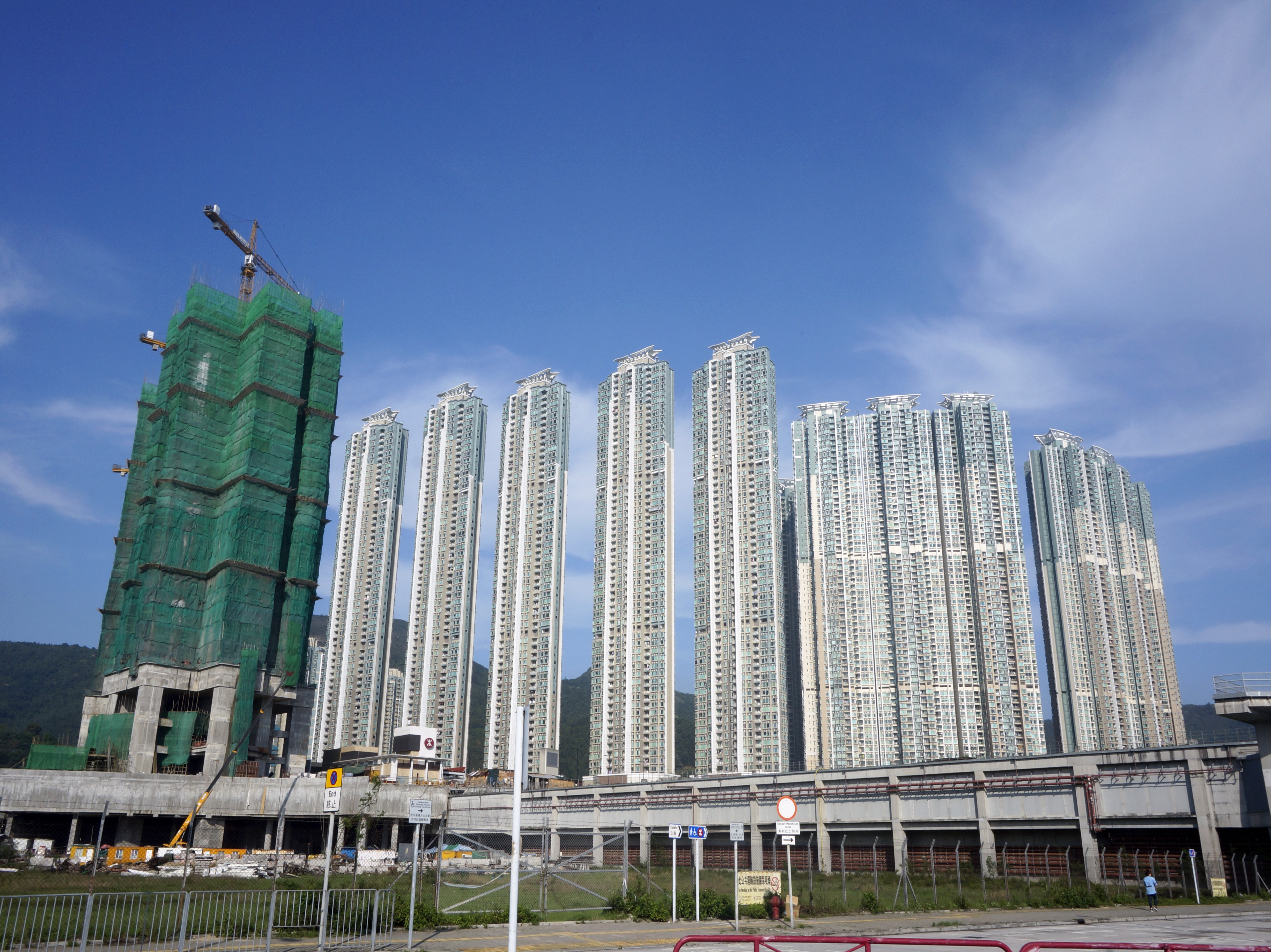 日出康城各期大廈